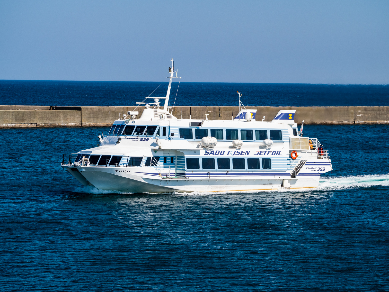 佐渡汽船のジェットフォイル「すいせい」両津港で撮影